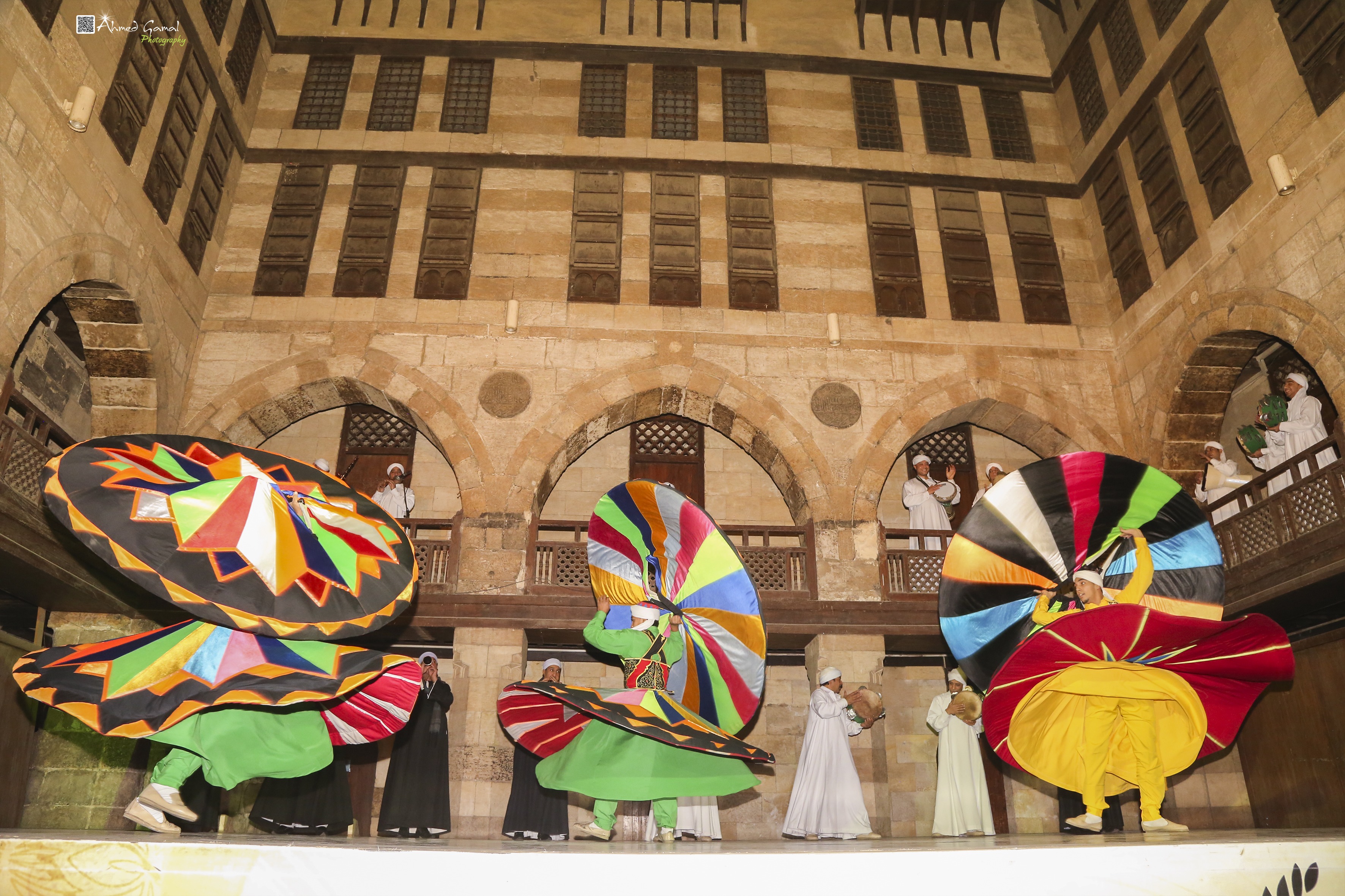 وكاله الغوري تراث مصري This is an image of music and dance from Egypt